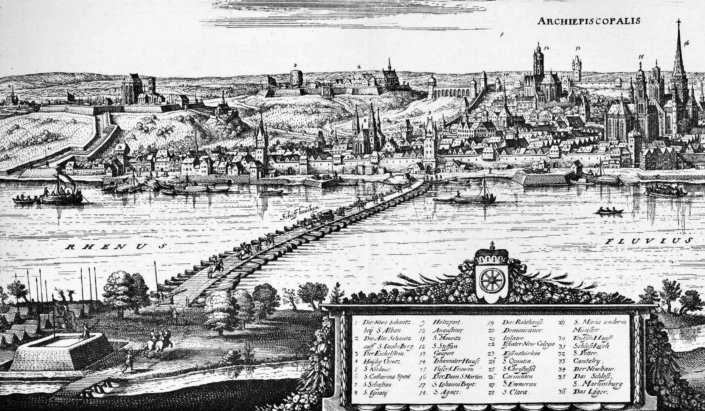 Stadt Mainz Ausschnitt Schiffbrücke